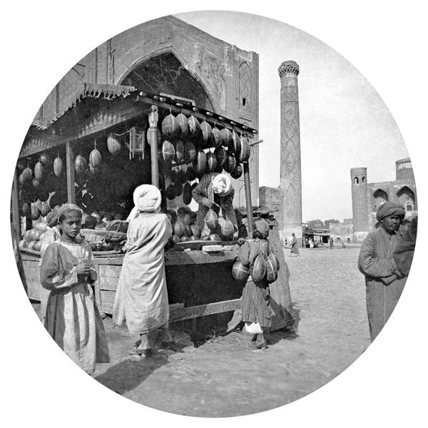 Из Стамбула в Ташкент: Фотопленки Поля Надара (1890). Часть 12. Самарканд